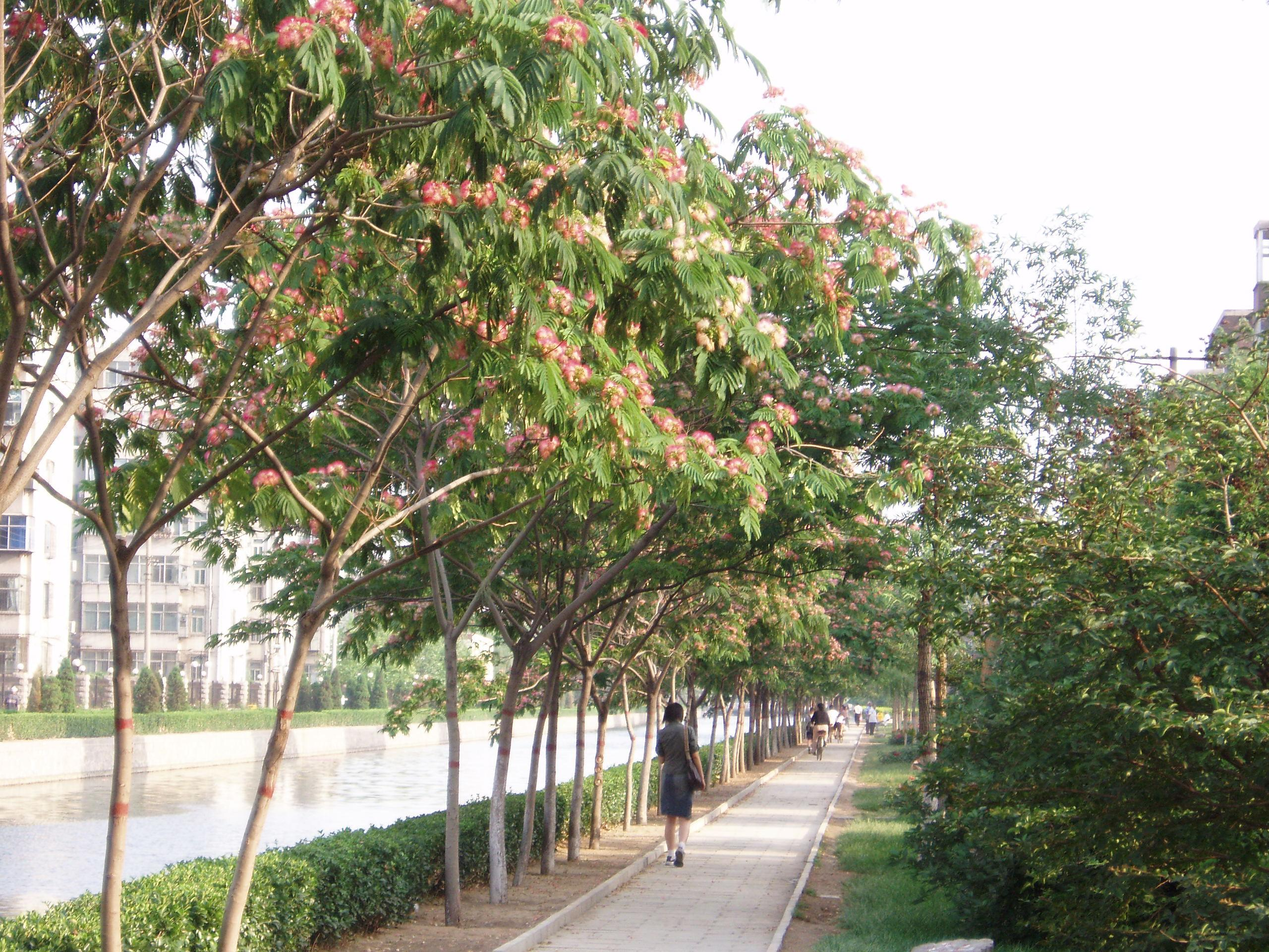 Albizzia julibrissin trees